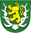 znak obce